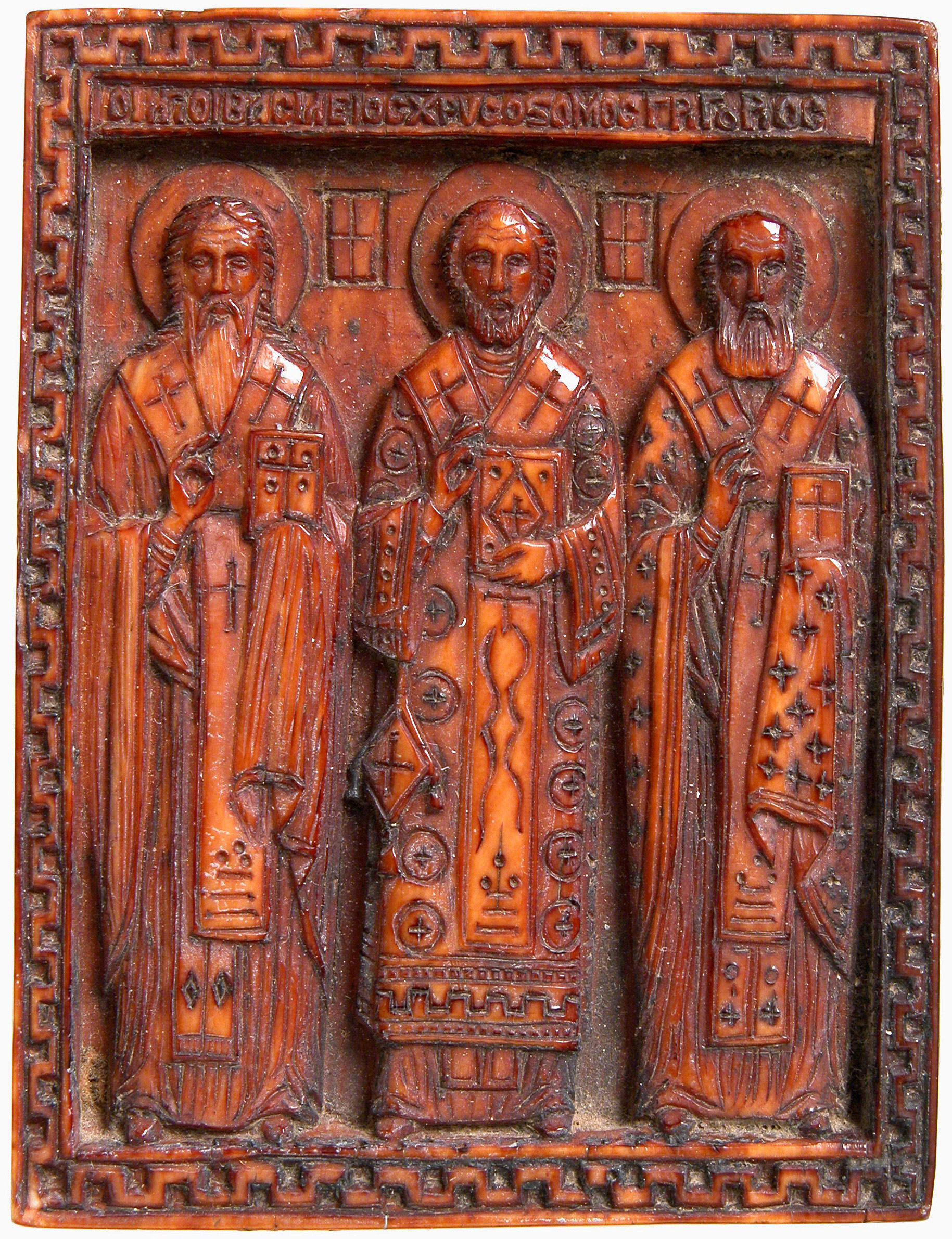 Greek; Plaque; Ivories